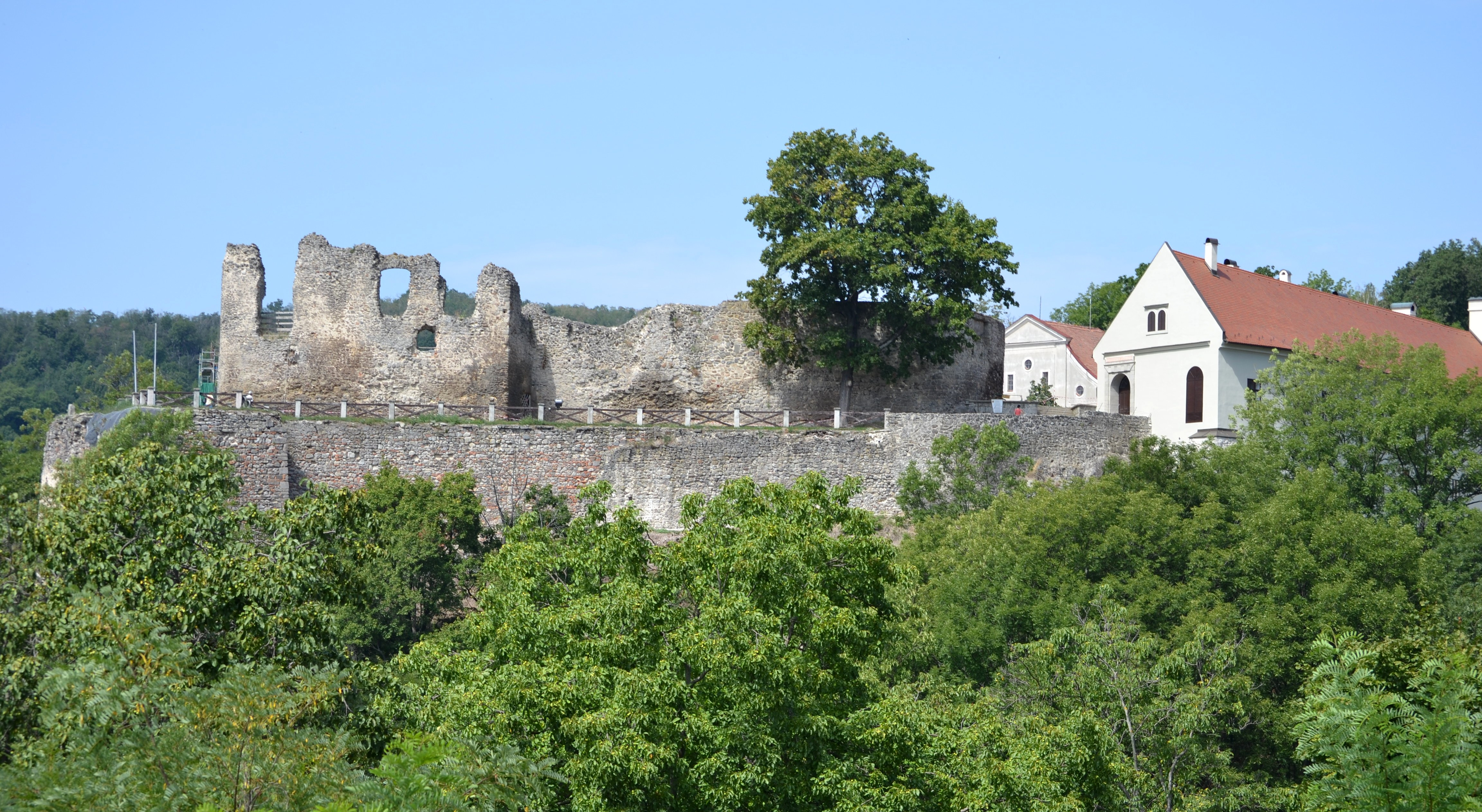 Hrad Modrý Kameň